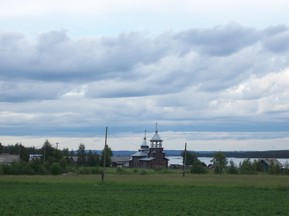 Vuokkiniemi village in Karelia, Russia